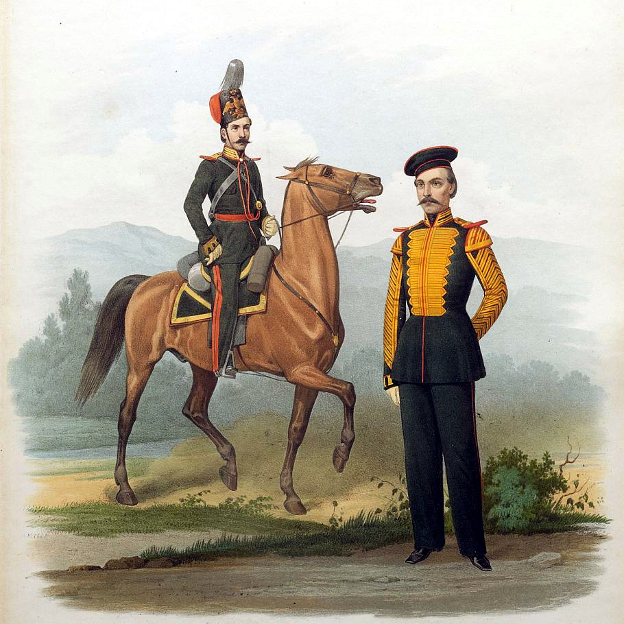 Бомбардир и трубач Лейб-гвардии Донской казачьей конноартиллерийской батареи. (В парадной и обыкновенной форме) 18 марта 1855 года.